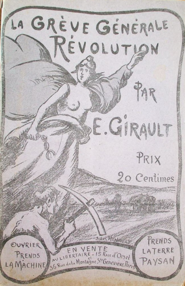 1e de couverture du livre d'Ernest Girault La Grève générale et la révolution (1903)